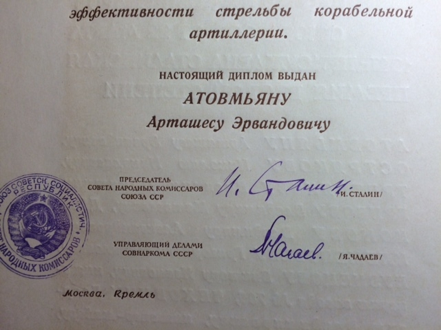 Подпись И. В. Сталина на дипломе, выданном Атовмьяну Арташесу Эрвандовичу